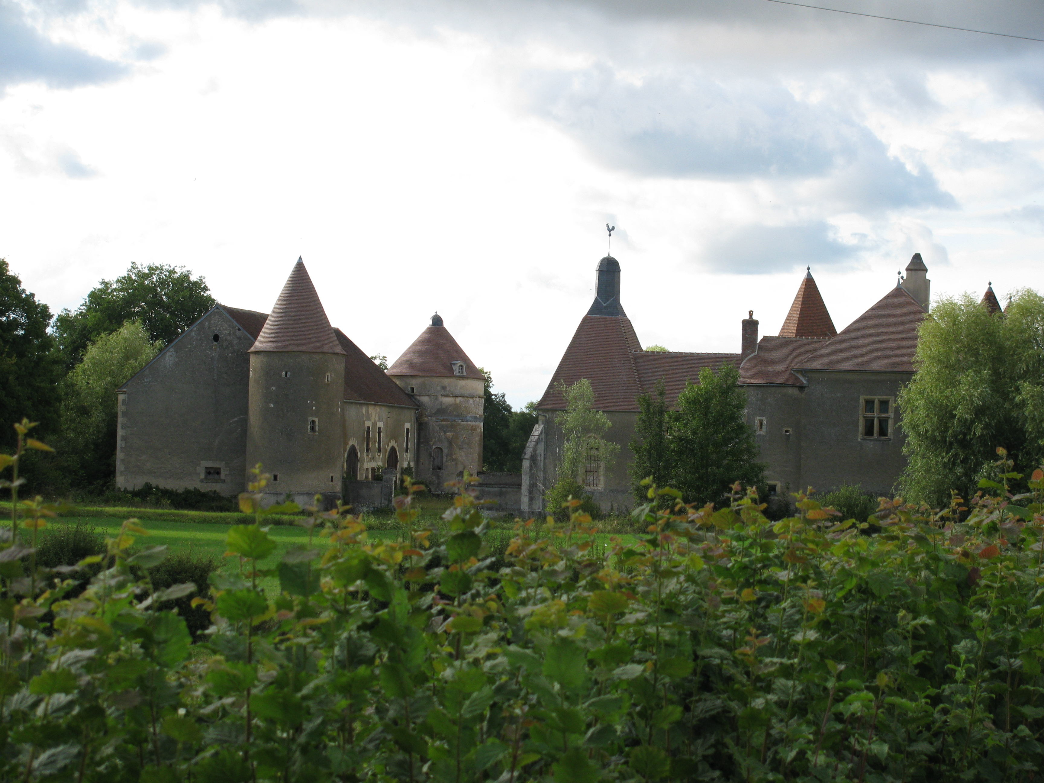 Château de Villiers à Menestreau, Nièvre, France.